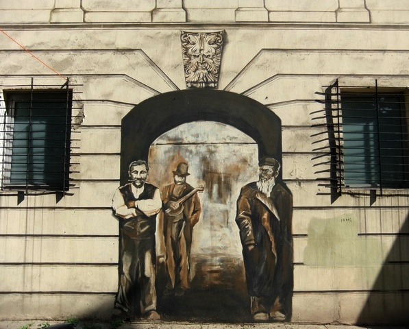 Kawałek Fresku przy ulicy Piotrkowskiej